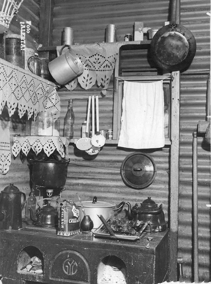 Buenos Aires, cocina obrera, 1941. Documento fotográfico. 320035. General Archive of the Nation Native nameArchivo General de la Nación ArgentinaLocationBuenos Aires, ArgentinaCoordinates34° 36′ 17″ S, 58° 22′ 14″ W Established28 August 1821Web pageAGNAuthority control : Q2860529 ISNI: 0000 0001 2375 5869 LCCN: n82144709 WorldCat institution QS:P195,Q2860529 This file, was provided to Wikimedia Commonsthanks to an agreement between the General Archive of the Nation of Argentina and Wikimedia Argentina.